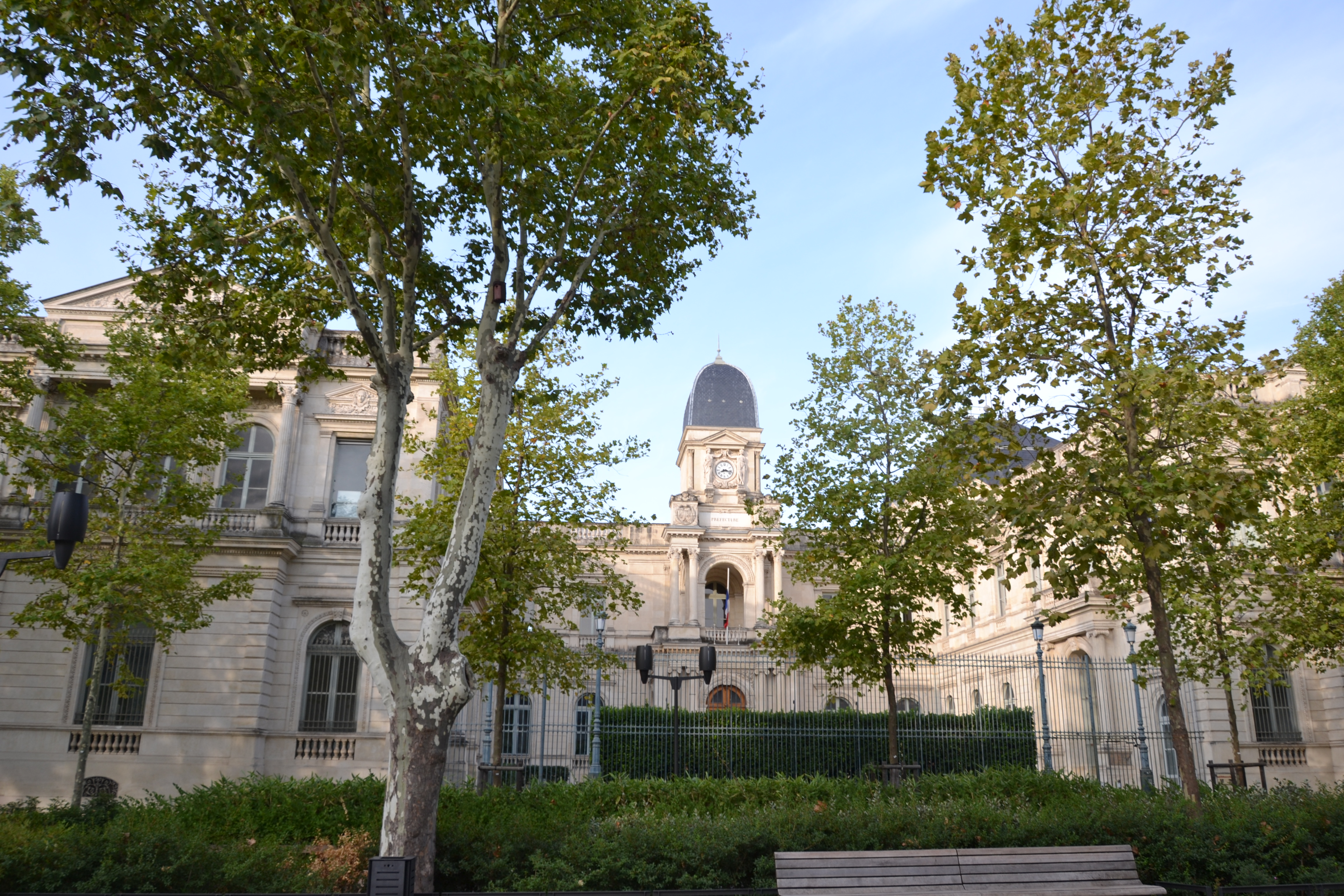 Préfecture du Gard, avenue Feuchères à Nîmes